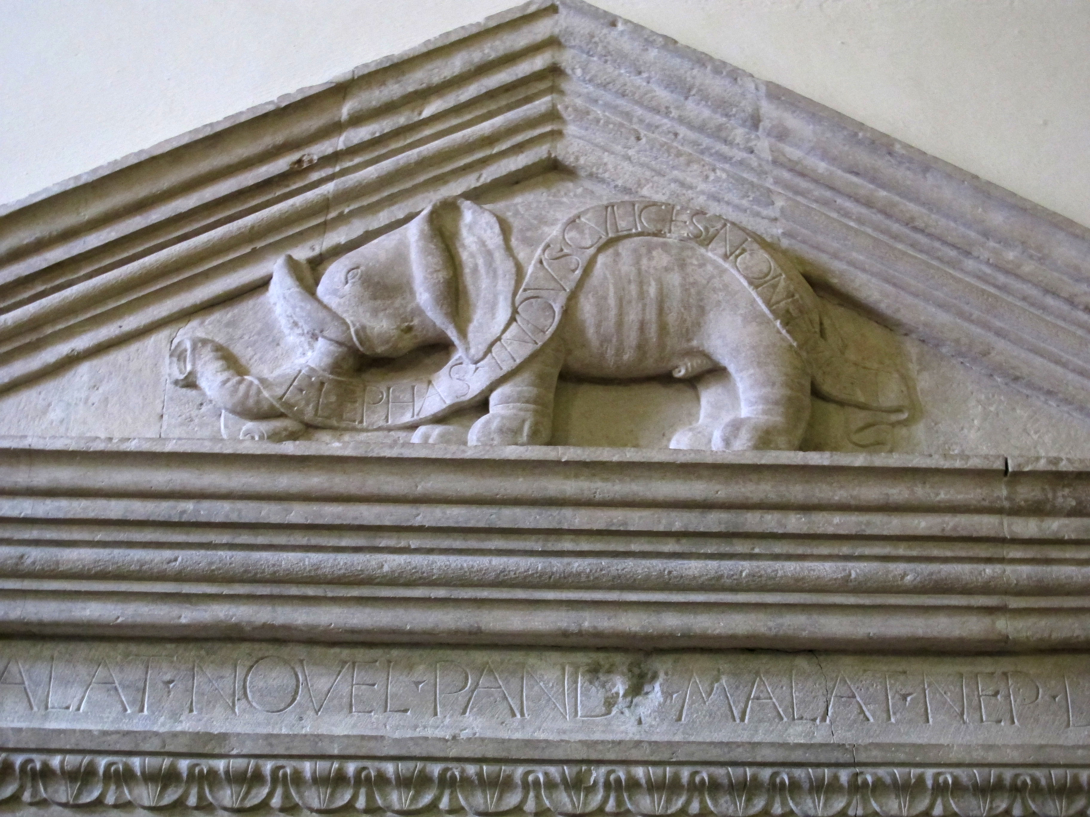 Biblioteca Malatestiana - MIBAC This is a photo of a monument which is part of cultural heritage of Italy.